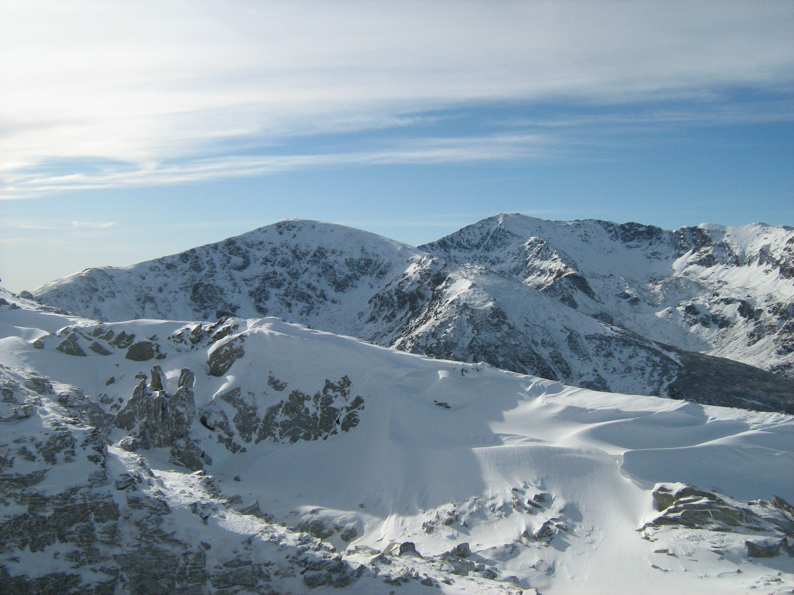 Creasta - Vf. Parângu Mare în spate